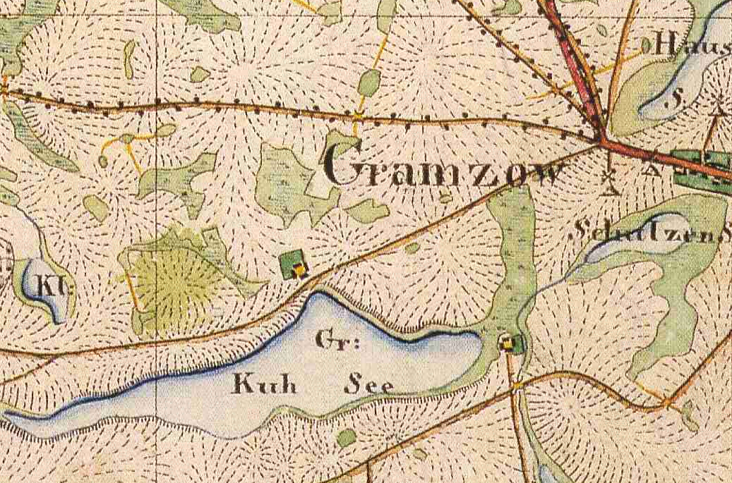 Karlshof, Wohnplatz von Gramzow, Lkr. Uckermark, Brandenburg, Ausschnitt aus dem Urmesstischblatt 2749 Potzlow von 1827